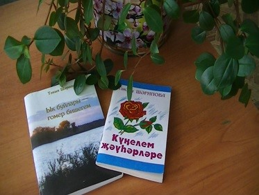 Татарча/tatarça: Тәкыя Шәһит кызы Шәрипованың китаплары